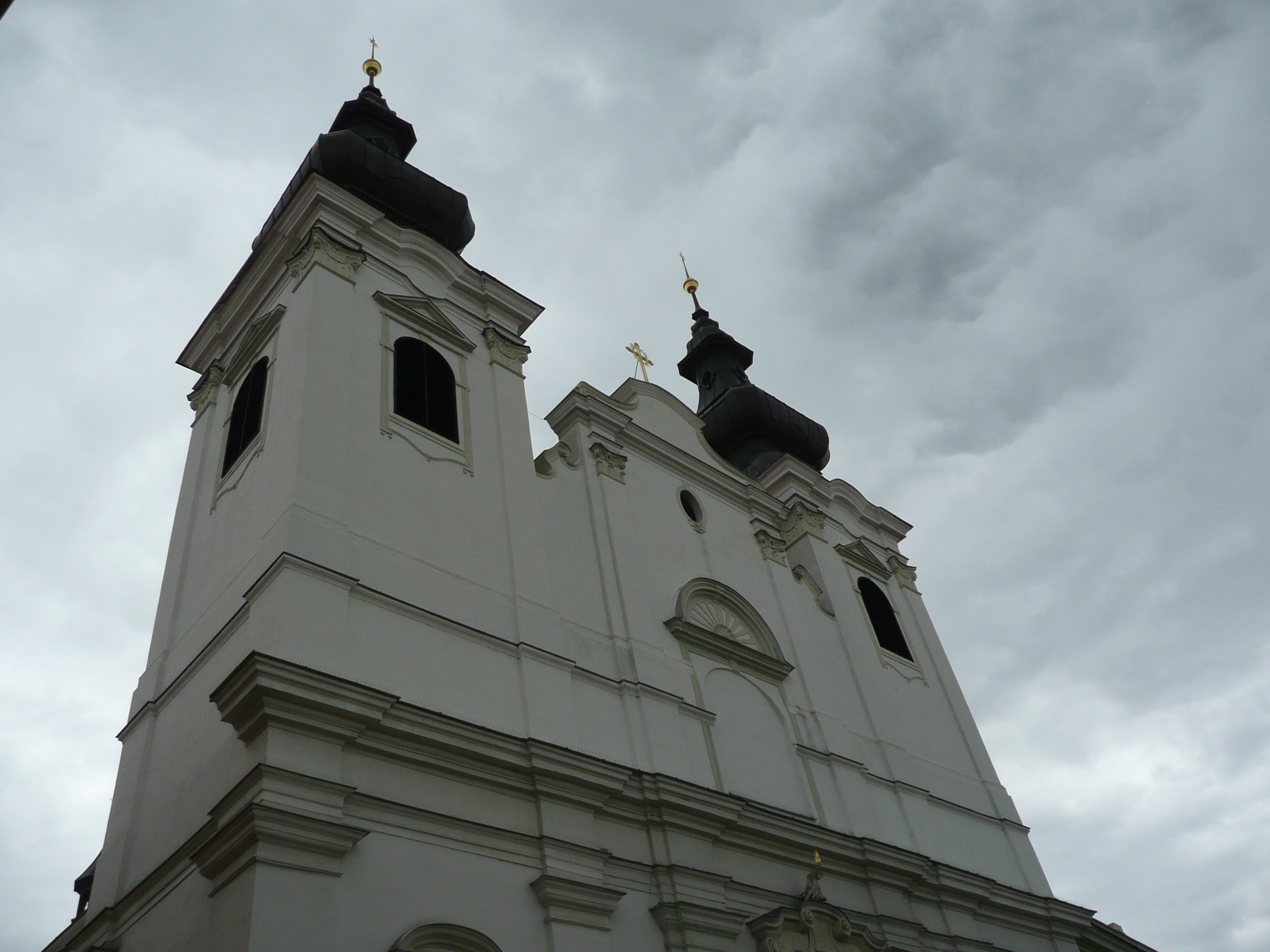 Kostel Povýšení sv. Kříže ve Znojmě